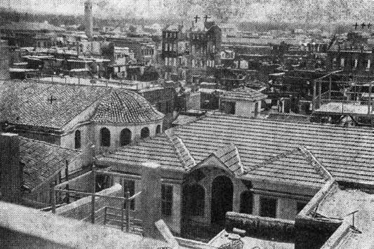 Meryem Ana Kilisesi